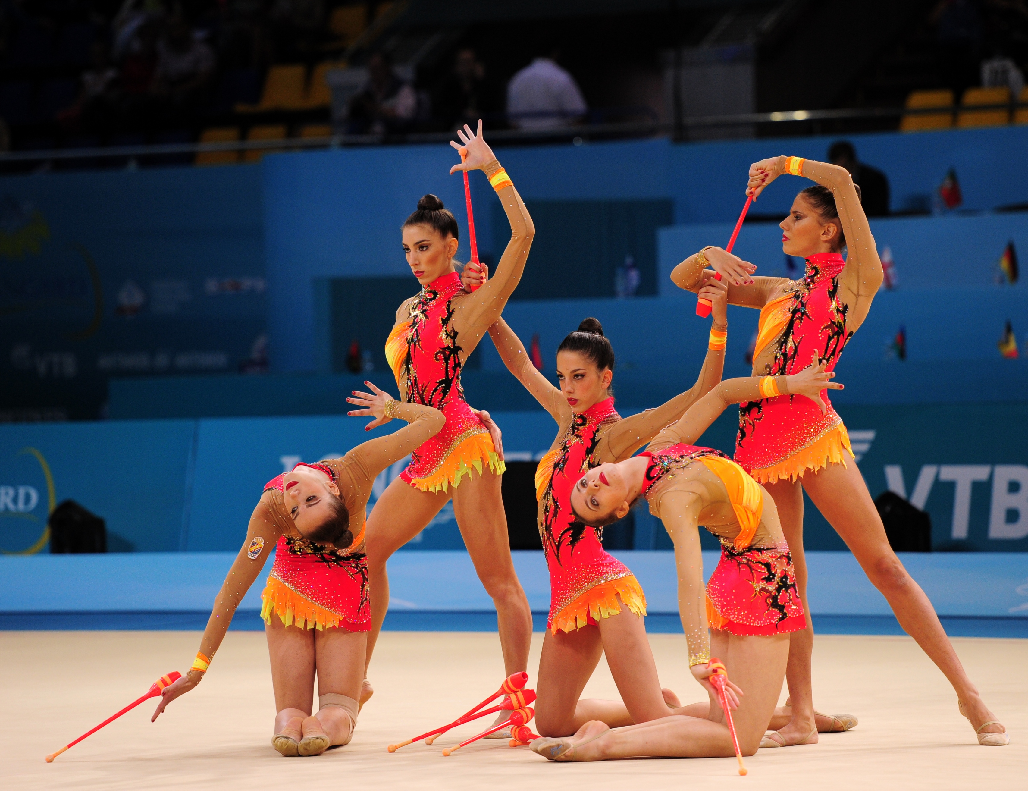 El conjunto español de gimnasia rítmica durante el inicio del ejercicio de 10 mazas en el Campeonato Mundial de Kiev en 2013.